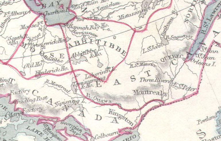 Carte de l'actuelle Abitibi-Témiscamingue en 1849